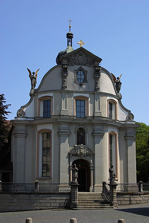 Barocke St. Kolumbanskirche in Rorschach